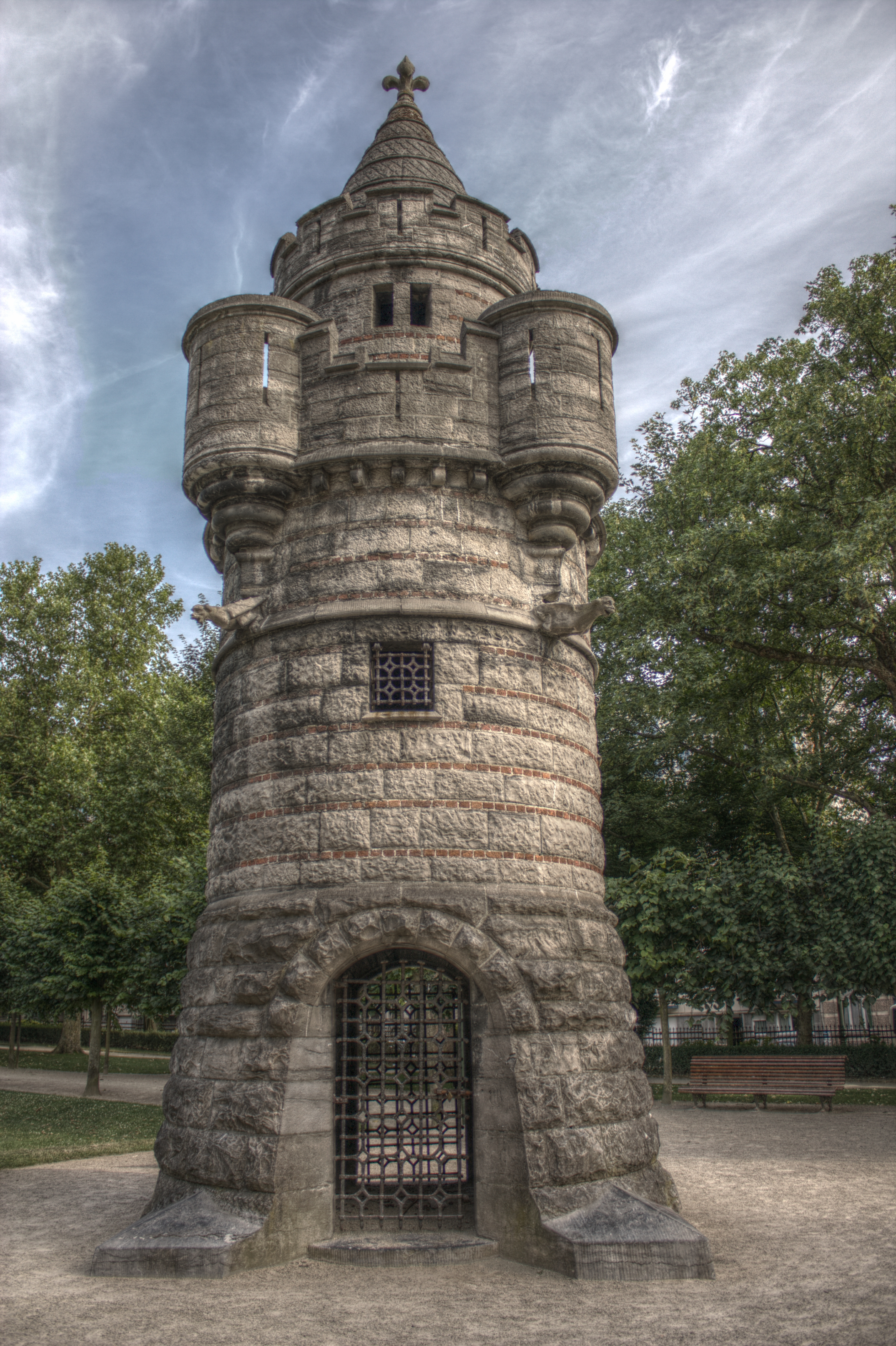 Tour située dans le parc du Cinquantenaire. Rendu HDR à l'aide du logiciel Qtpfsgui.